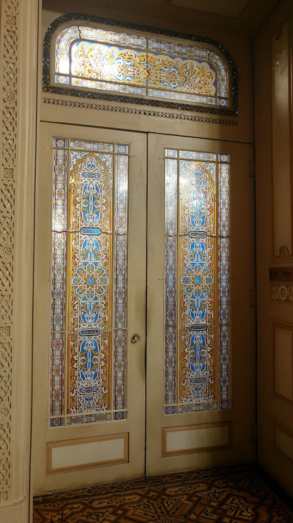 Arabic Room, Palacio de Bolsa, Porto, Portugal